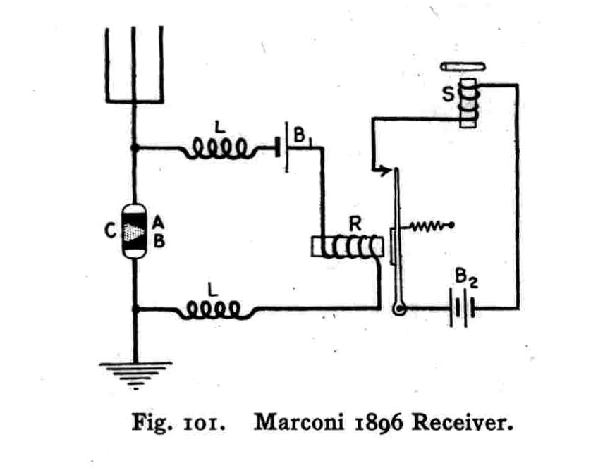 Fritter